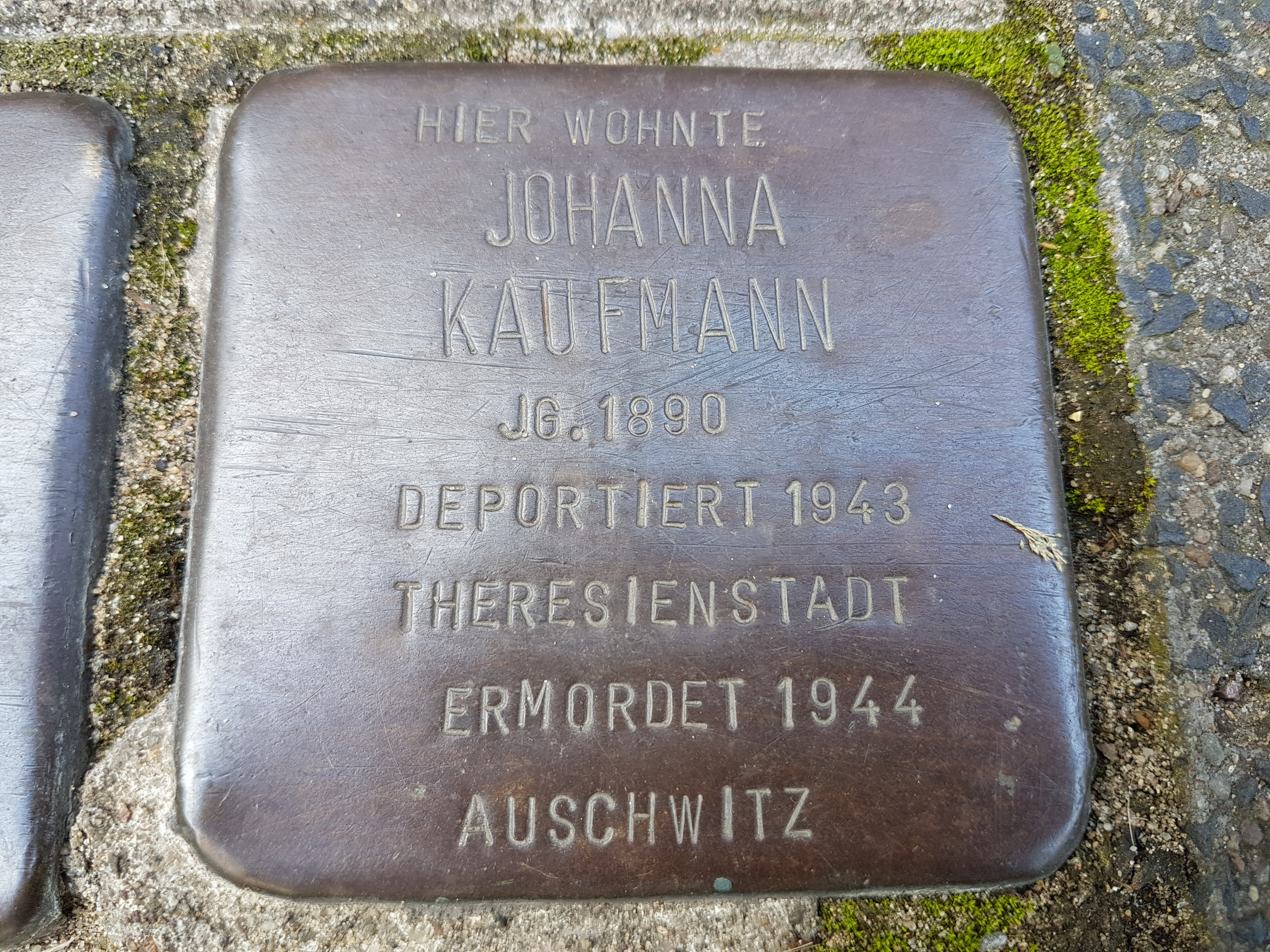 Stolperstein Duisburg Johanna Kaufmann